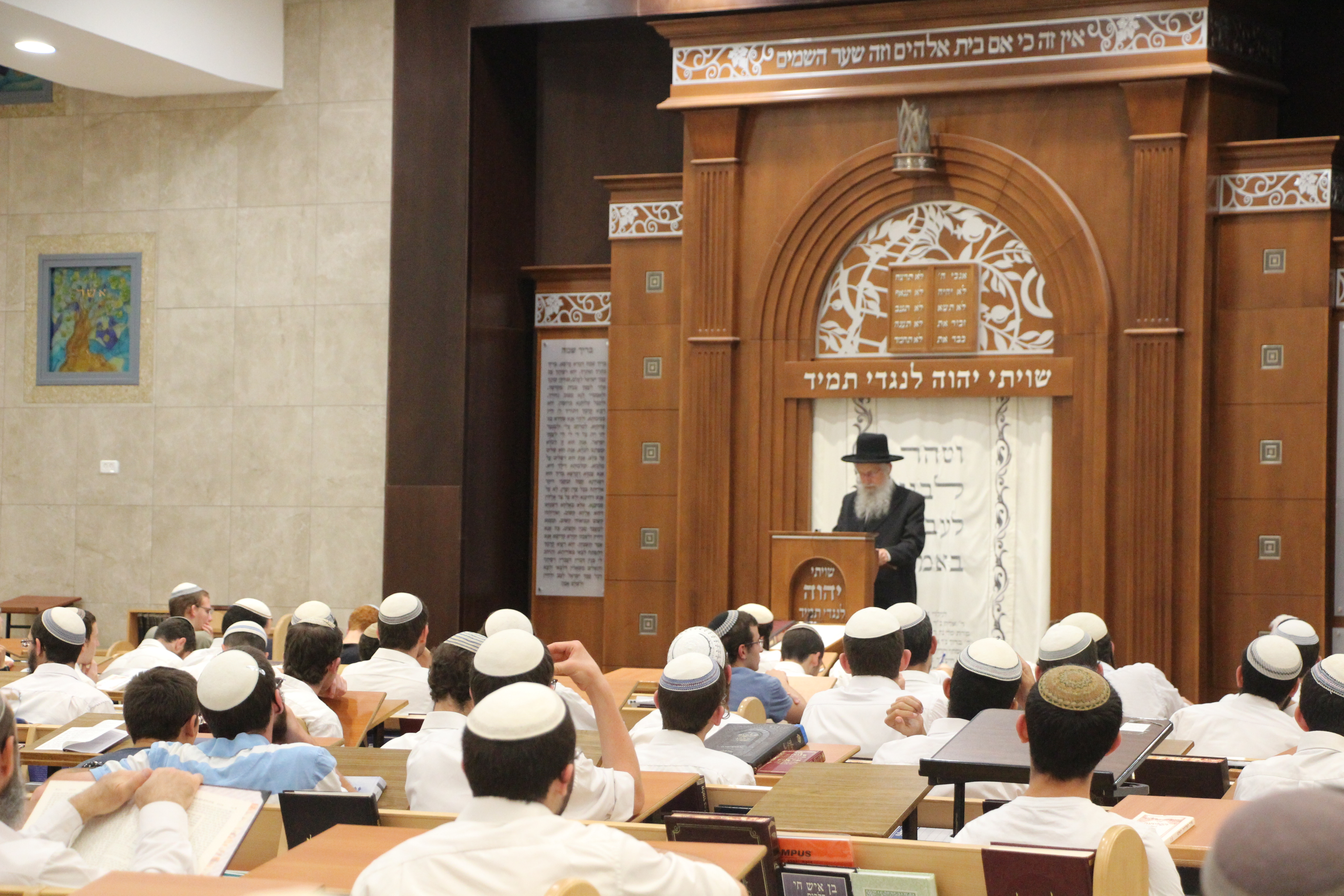 ישיבת בית אל